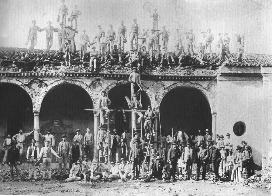 Milano, la demolizione del Lazzaretto